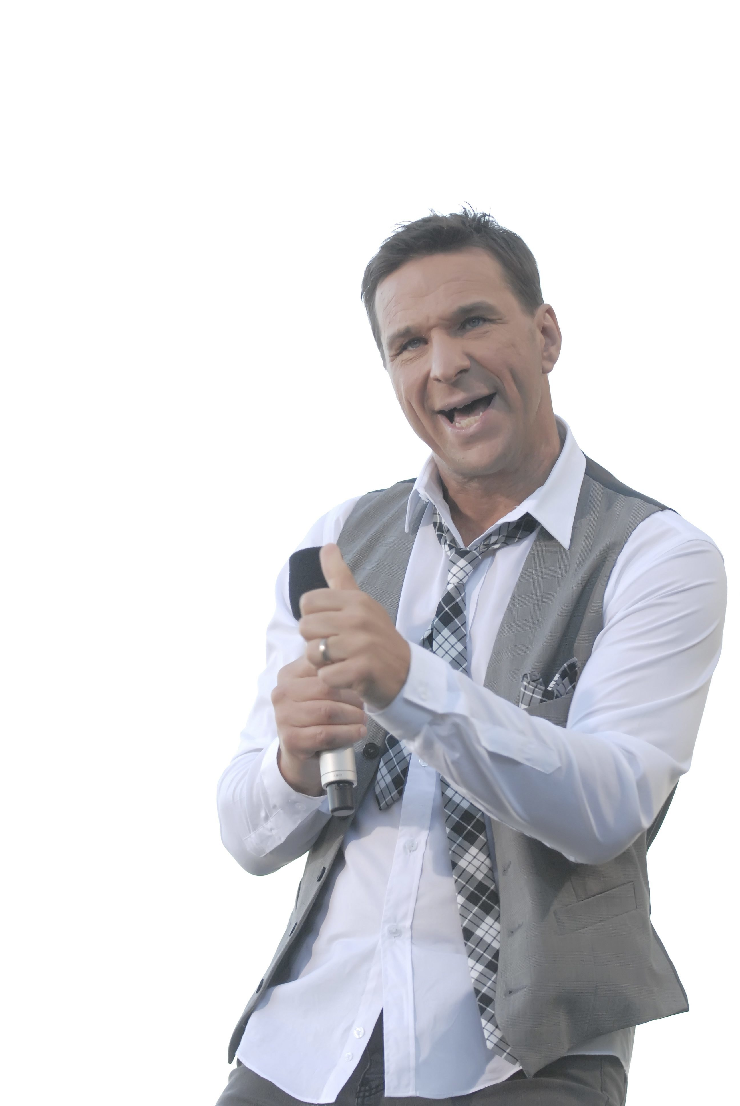 Programledaren Anders Lundin.